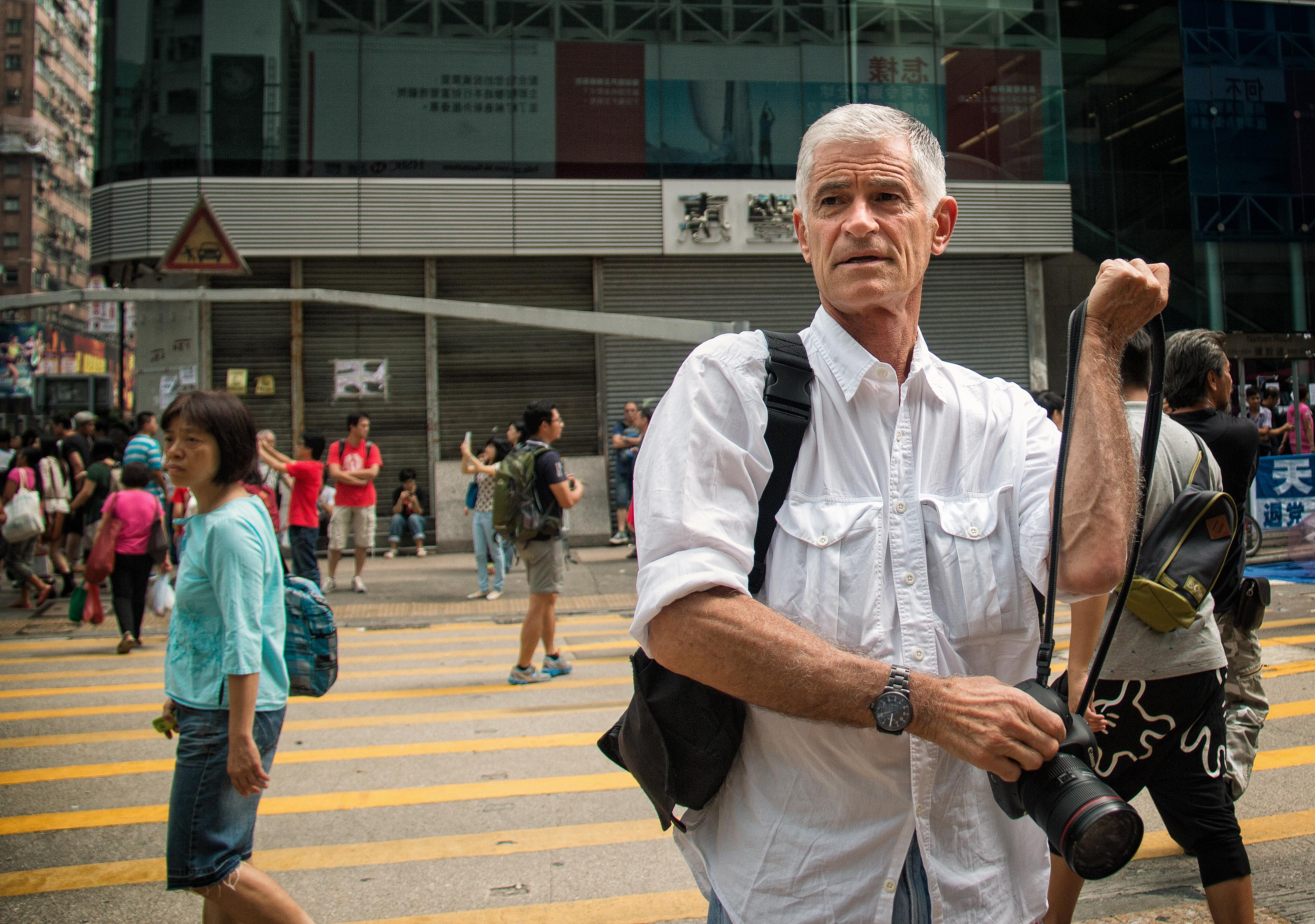 美國著名戰地攝影師James Nachtwey出現在香港旺角的佔中現場